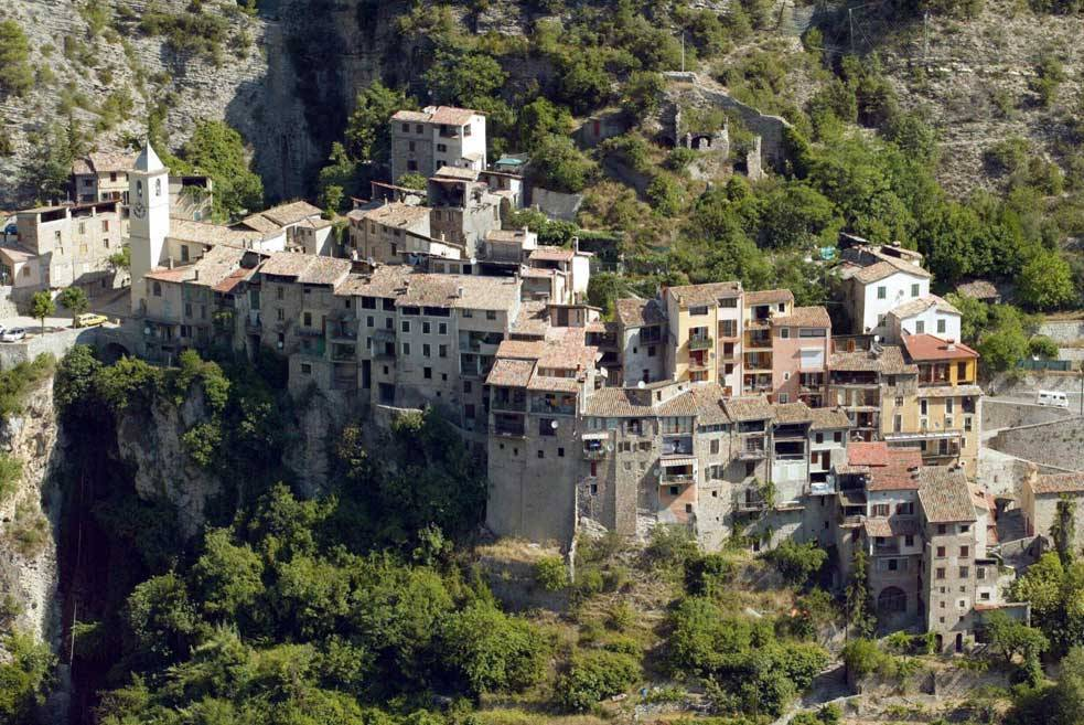 Le Haut-Village de Touët-sur-Var